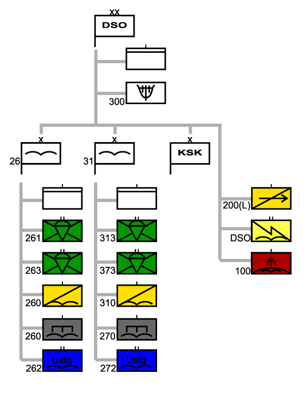 Gliederung DSO im deutschen Heeres.